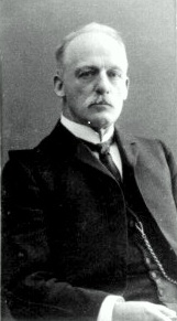 Porträt Henry Suermondt